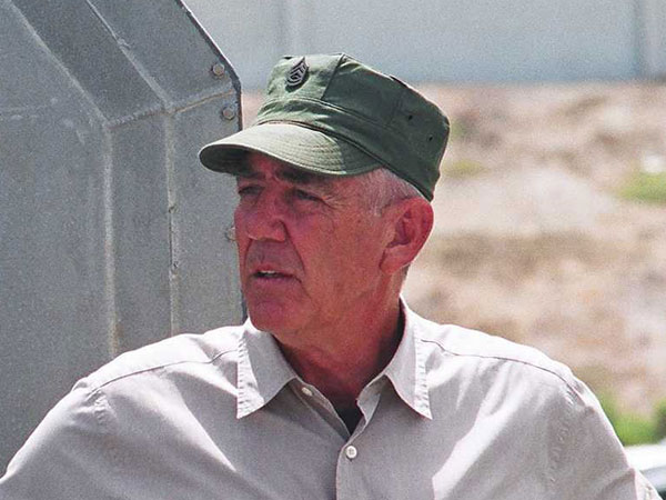 R. Lee Ermey